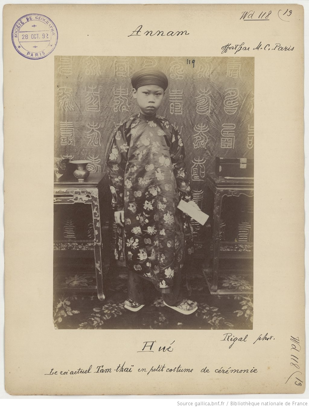 d'Annam et du Tonkin, par P. Dieulefils, photogr. à Hanoi, et Rigal, dont les portraits du jeune roi d'Annam, Tam-thaï (sic), et du défunt roi, Dong-Khanh, don Camille Paris en 1892